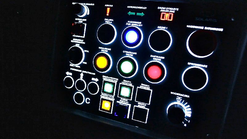 Tramino